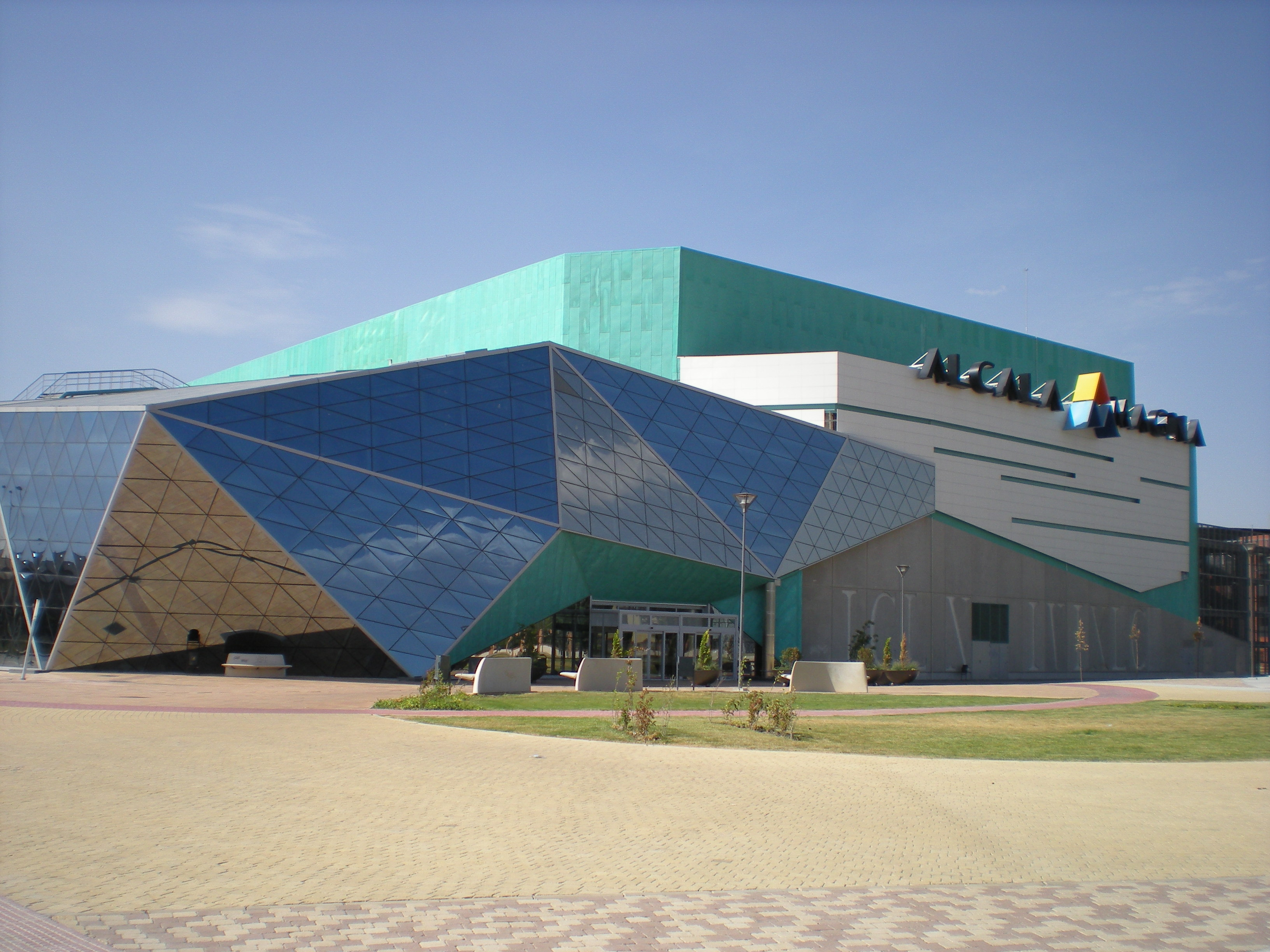 Centro Comercial Alcalá Magna Alcalá de Henares. Comunidad de Madrid. España